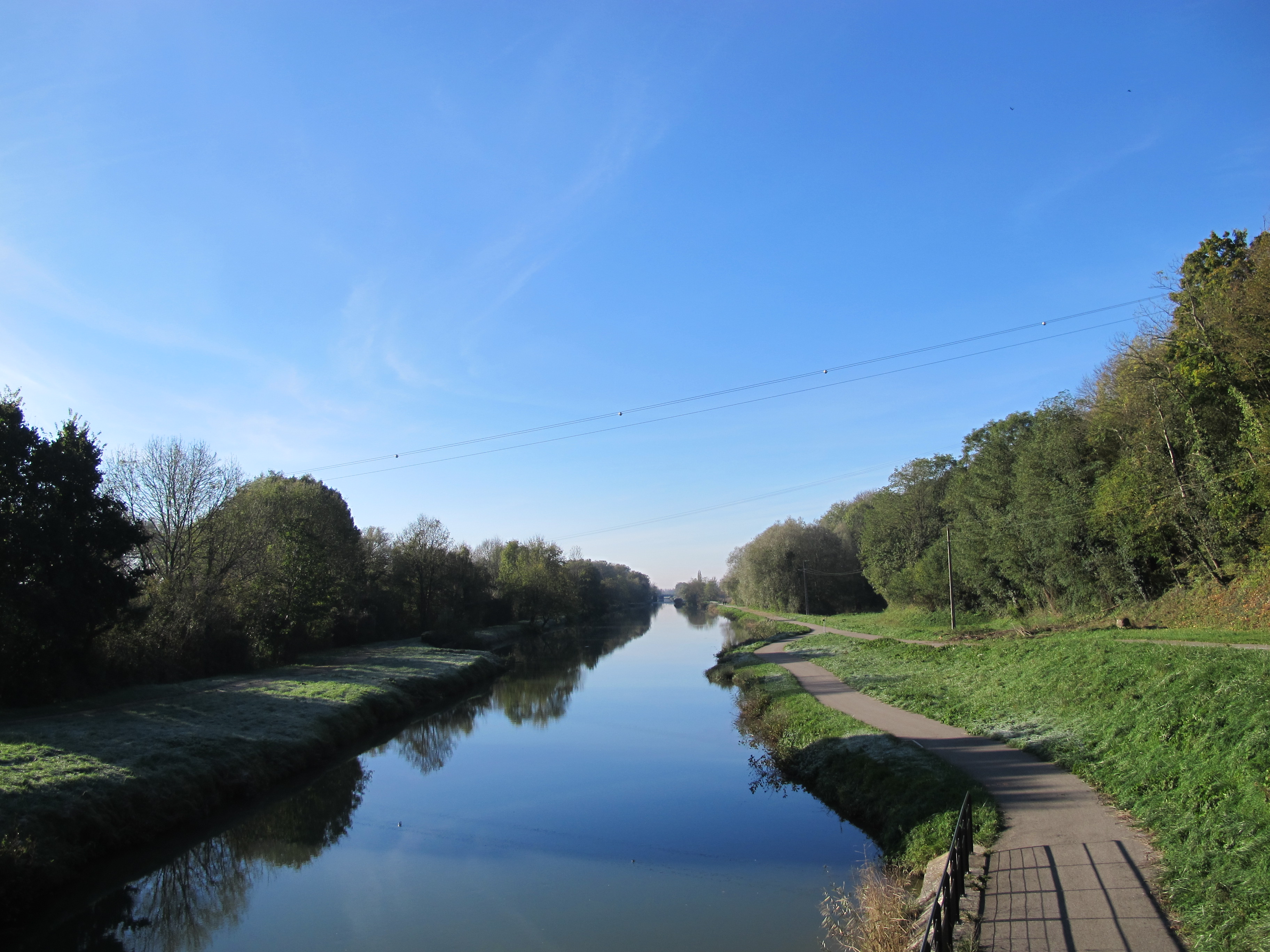 Canal datant du début du XIXe siècle passant à Choisey à proximité de Dole. Jura France